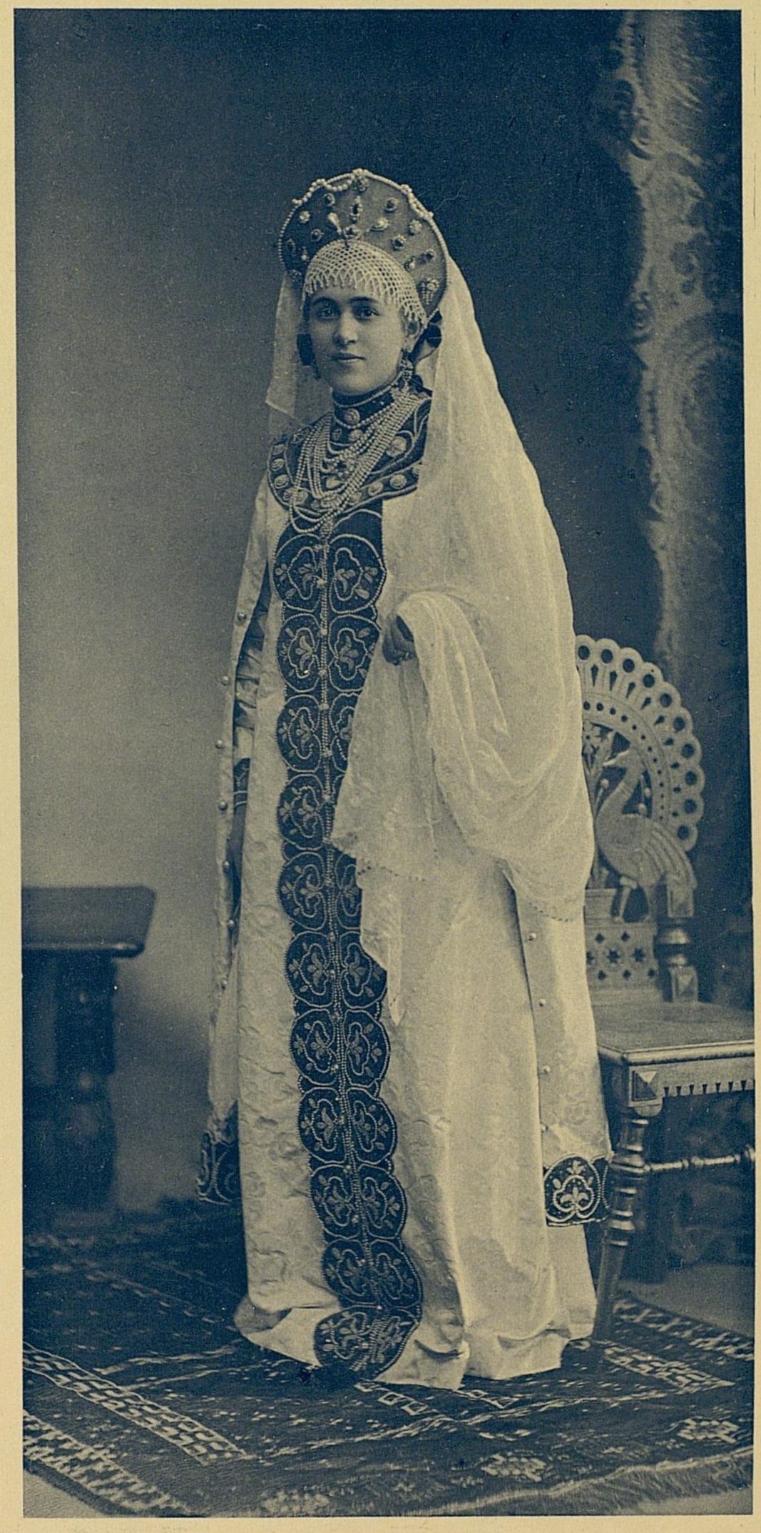 Мария Александровна Мансурова, урождённая Ребиндер в боярском летнике XVII века.